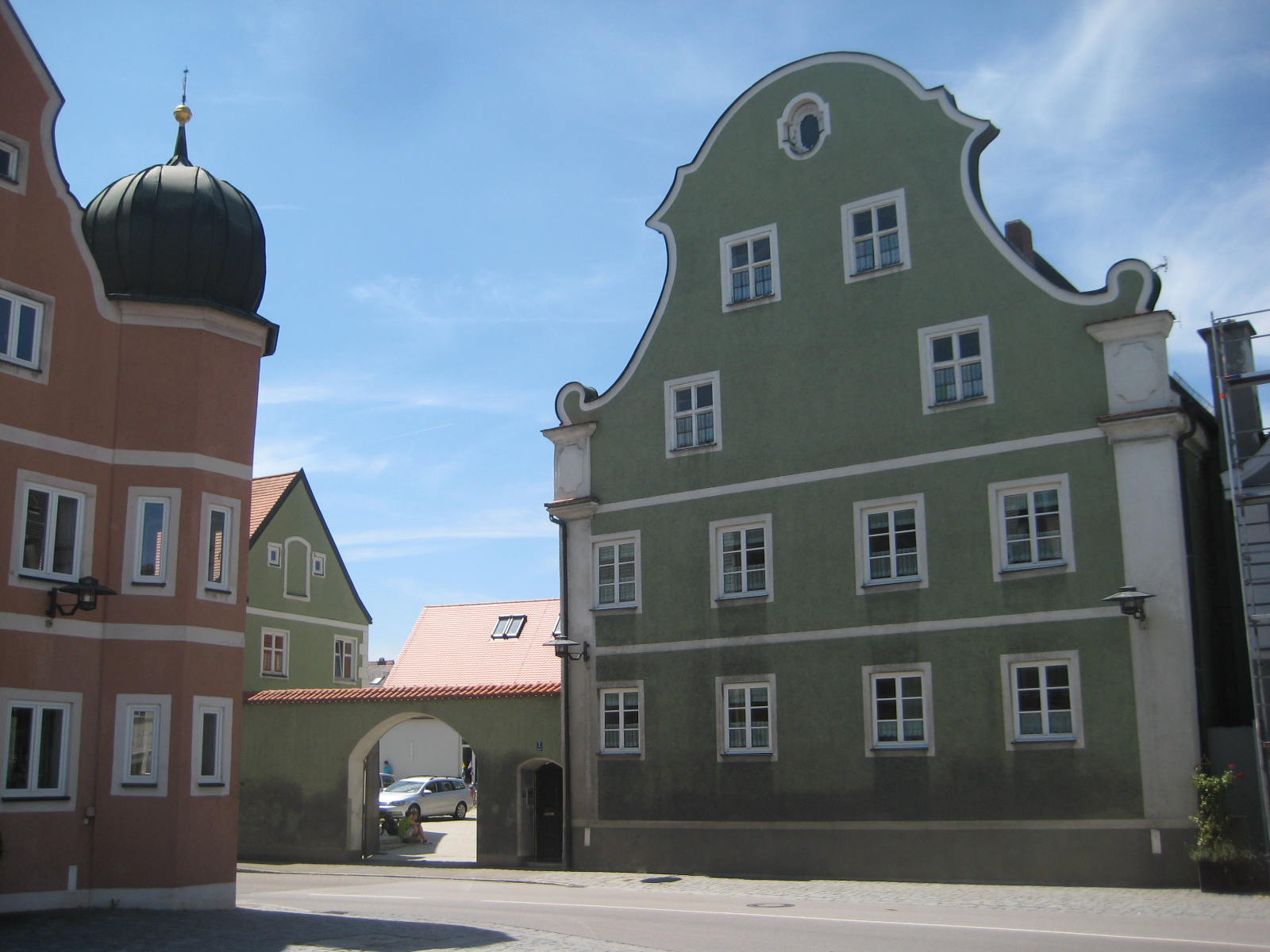 Geisenfeld liegt im Landkreis Pfattenhofen a.d. Ilm